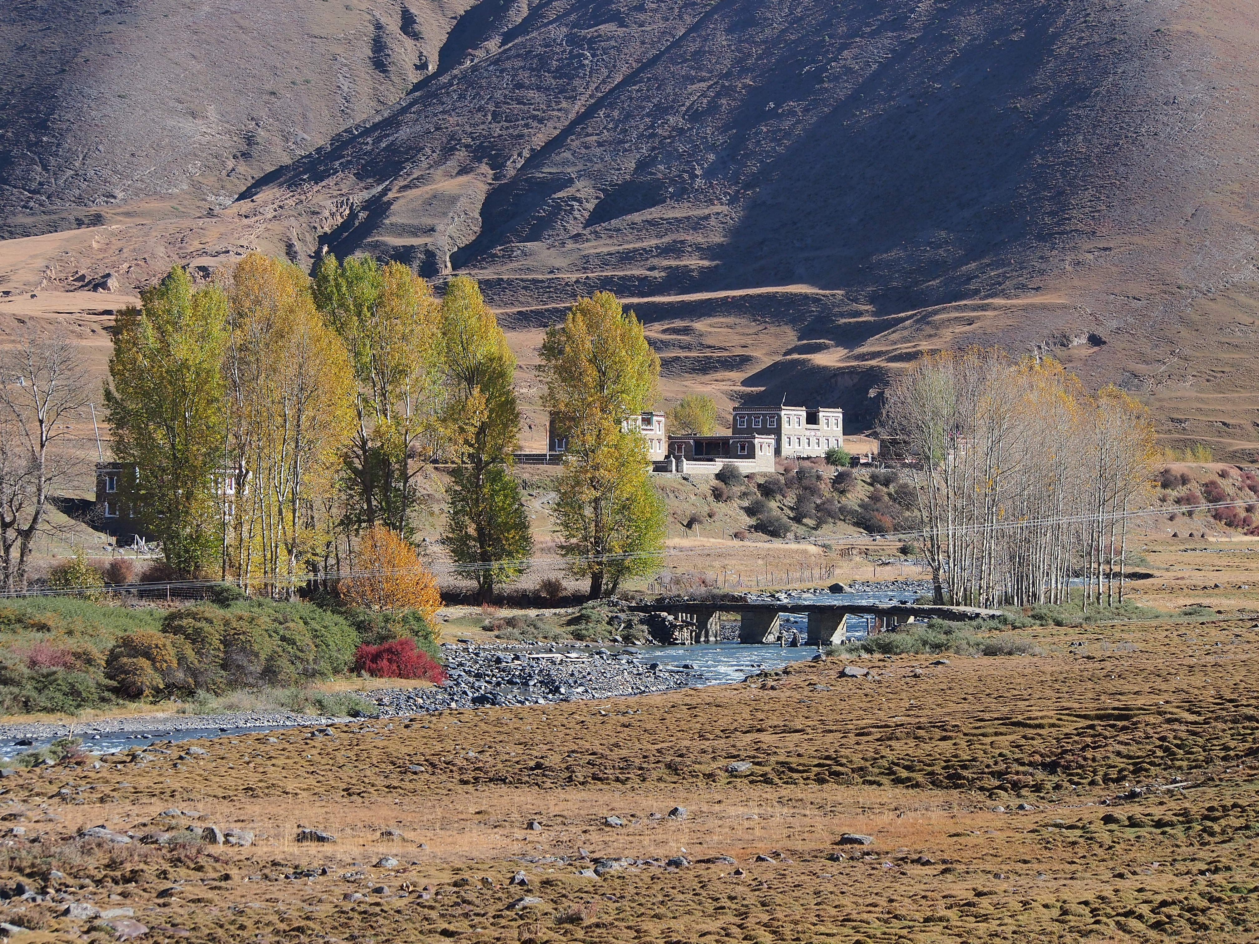 小桥流水人家 - Picturesque Village - 2012.10